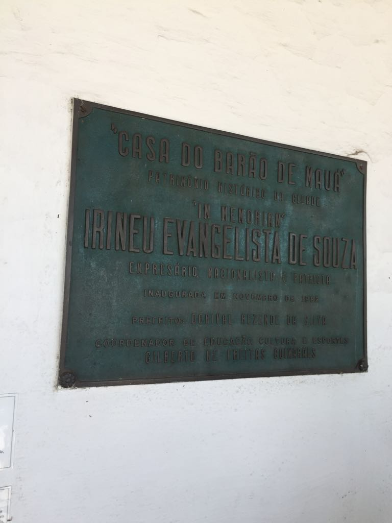 Placa com dizeres sobre Irineu Evangelista de Souza, o Barão de Mauá Board with phrases about Irineu Evangelista de Souza, called Barão de Mauá